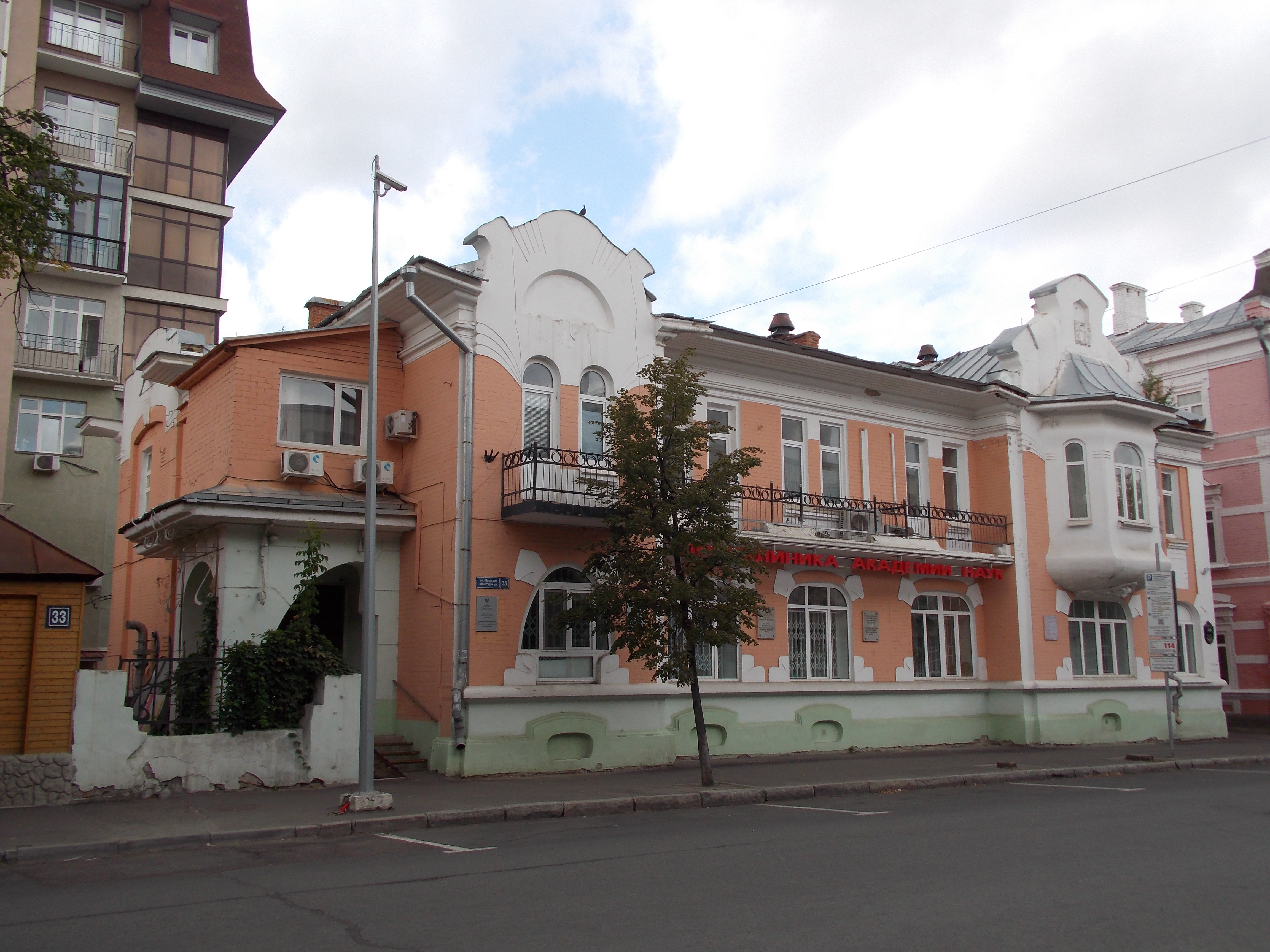 Дом, в котором жил писатель Галимжан Ибрагимов: улица Муштари (бывшая Комлева), 33, Казань, Татарстан